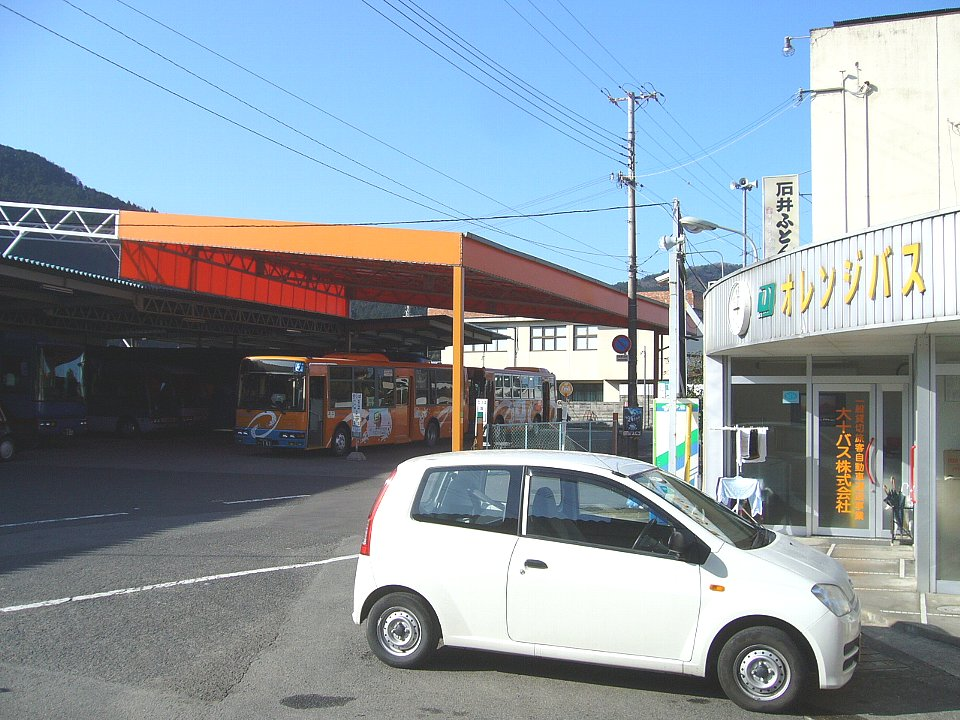 大十バス本社（右） 奥の車庫の位置に野上電気鉄道登山口駅があった